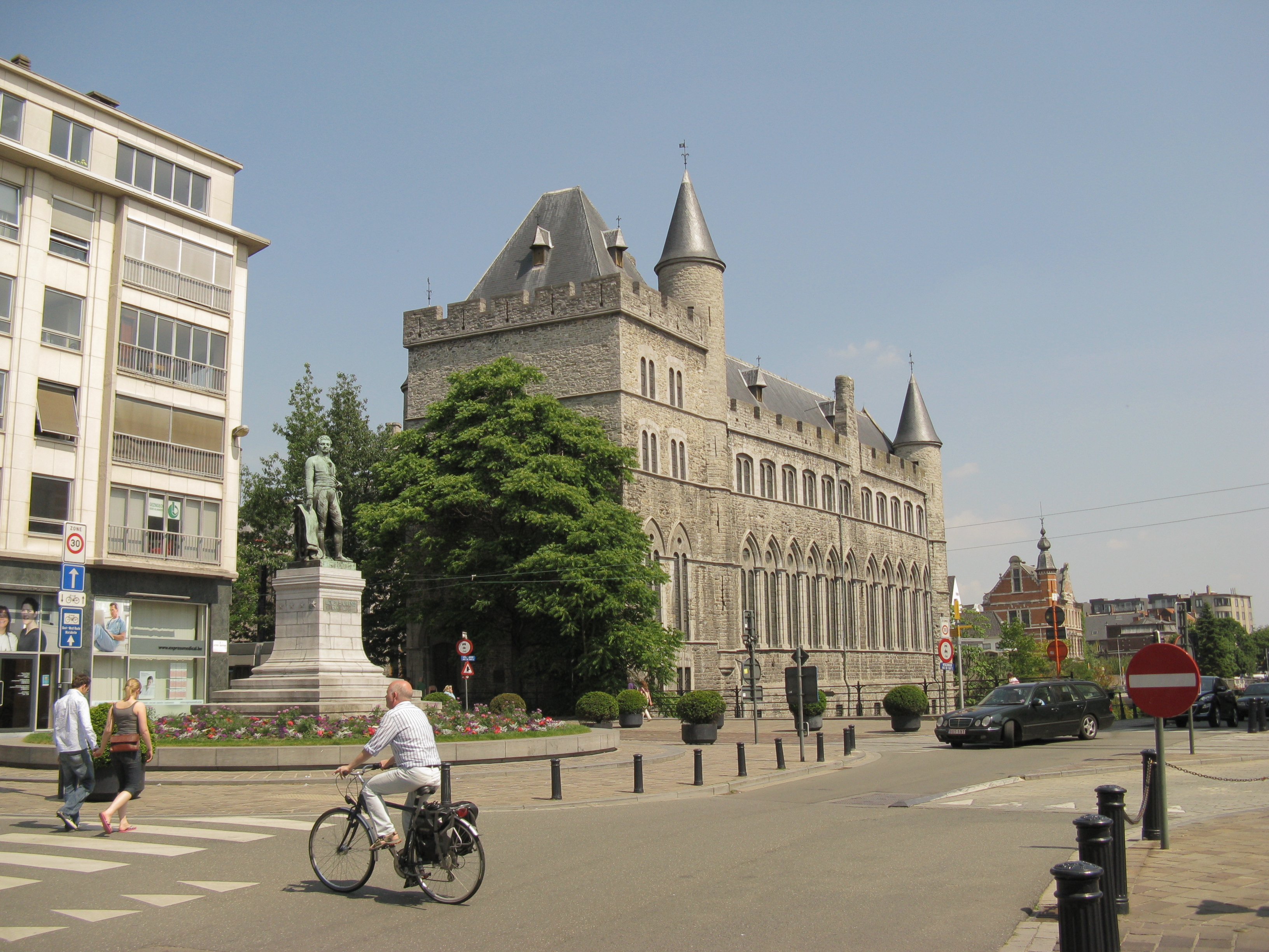 Standbeeld van Lieven Bauwens en Geeraard de Duivelsteen in Gent, België.